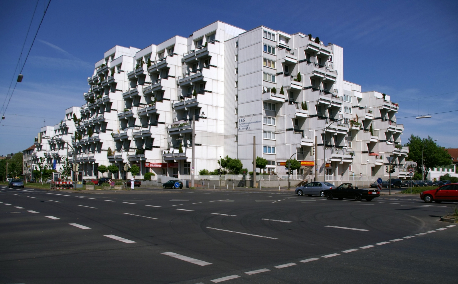 Der Hannibal an der Bornstraße, Dortmund